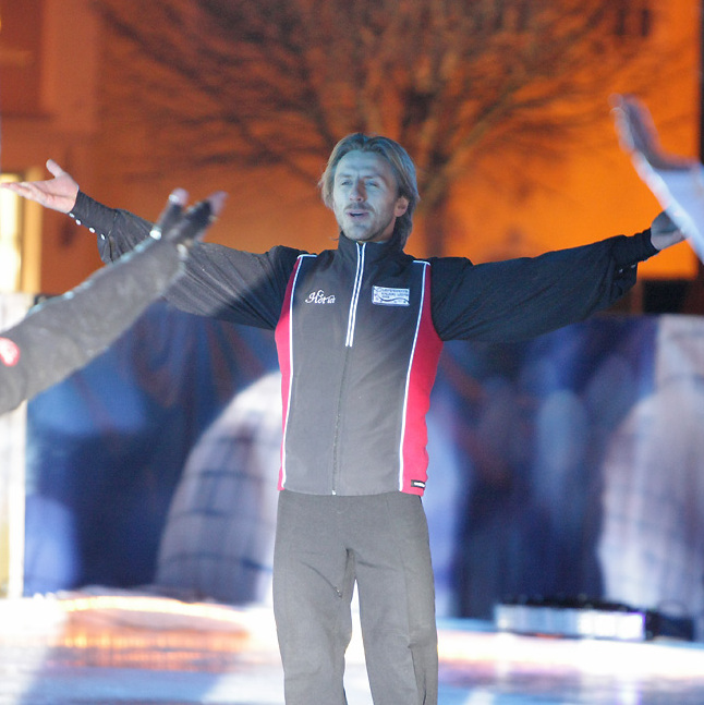 Povilas Vanagas Vilniuje, Rotušės aikštėje surengtame spektaklyje "Ledo misterija".